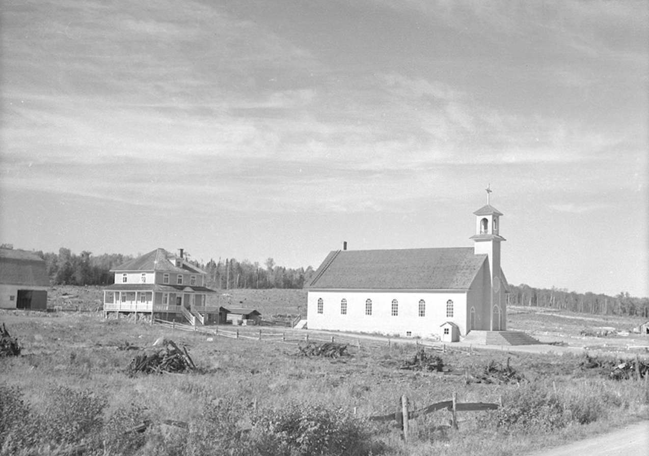 Église et presbytère de Saint-Omer (L'Islet) en 1942